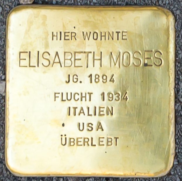 Stolpersteine Familie Moses, Elisenstraße 3, Köln Text: Hier wohnte Lucie Moses geb. Rothschild Jg. 1871 Flucht 1938 USA überlebt